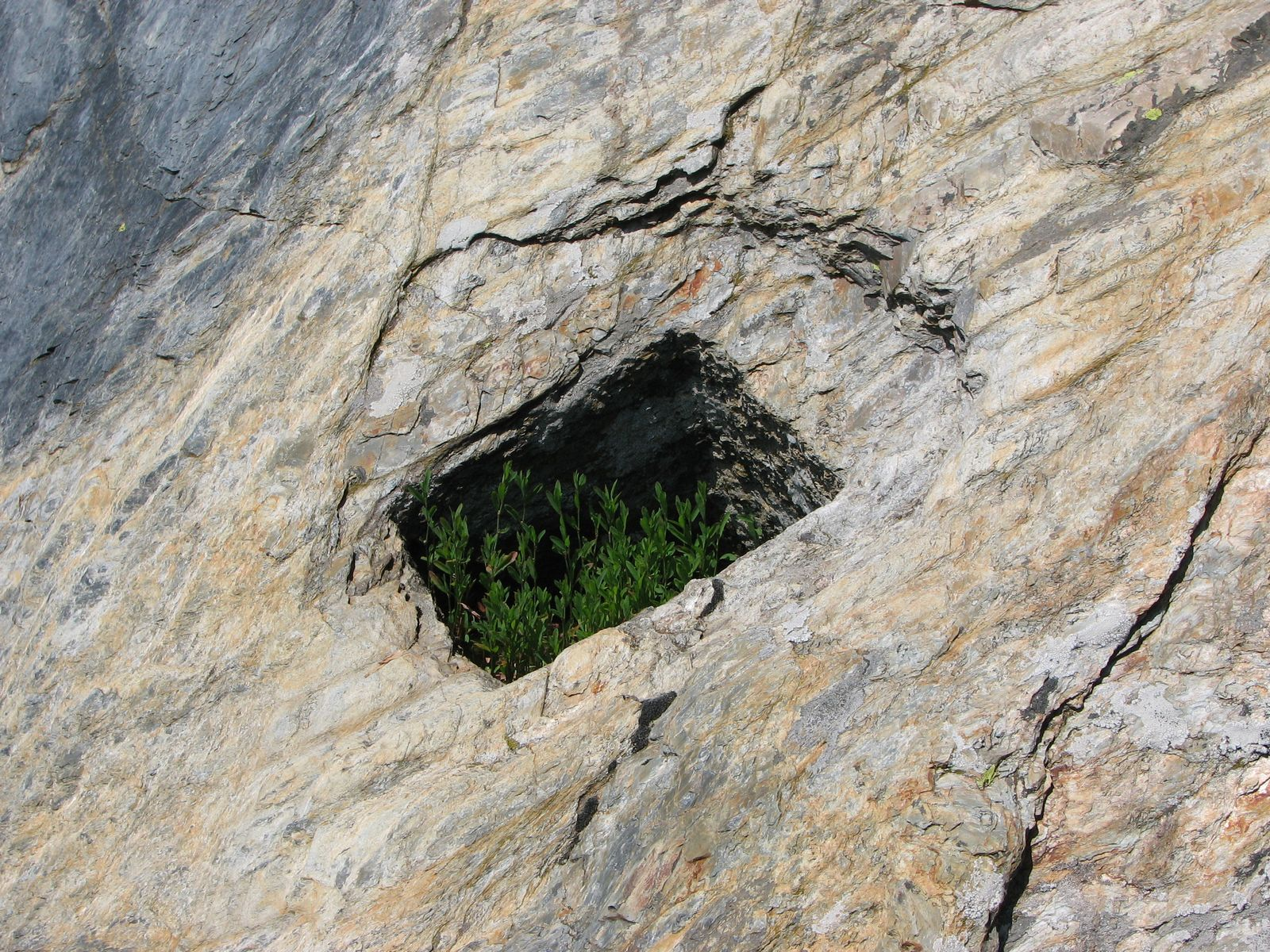 Foro da piro sulla lizza delle cave Catino, Toscana - Italia